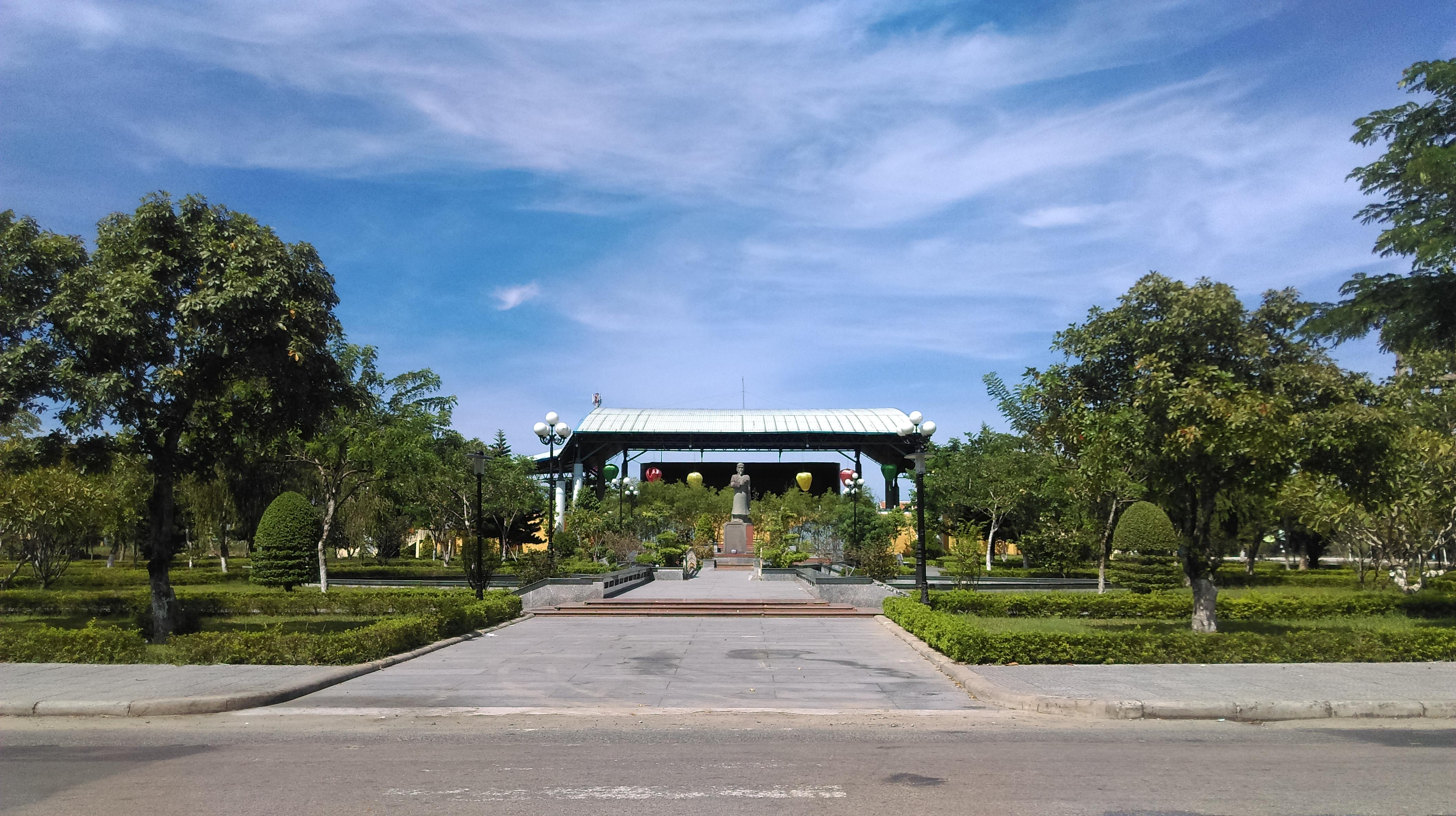 Nhà hát Hội An, Quảng Nam